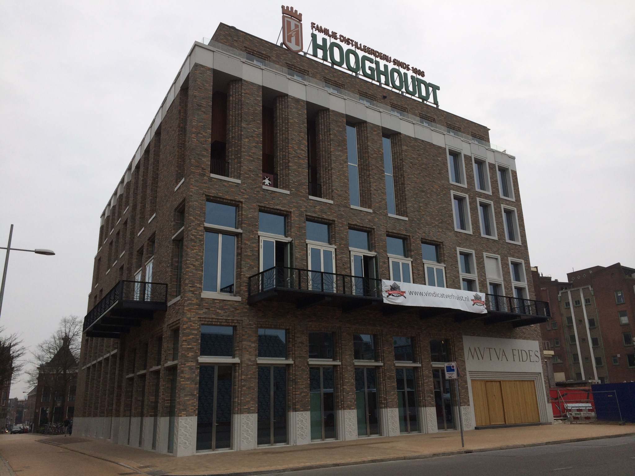 Studentensociëteit Mutua Fides, Grote Markt 27, Groningen. Dit is het achtste onderkomen van de studentensociëteit die op 17 februari 1815 werd opgericht, eveneens aan de Grote Markt.